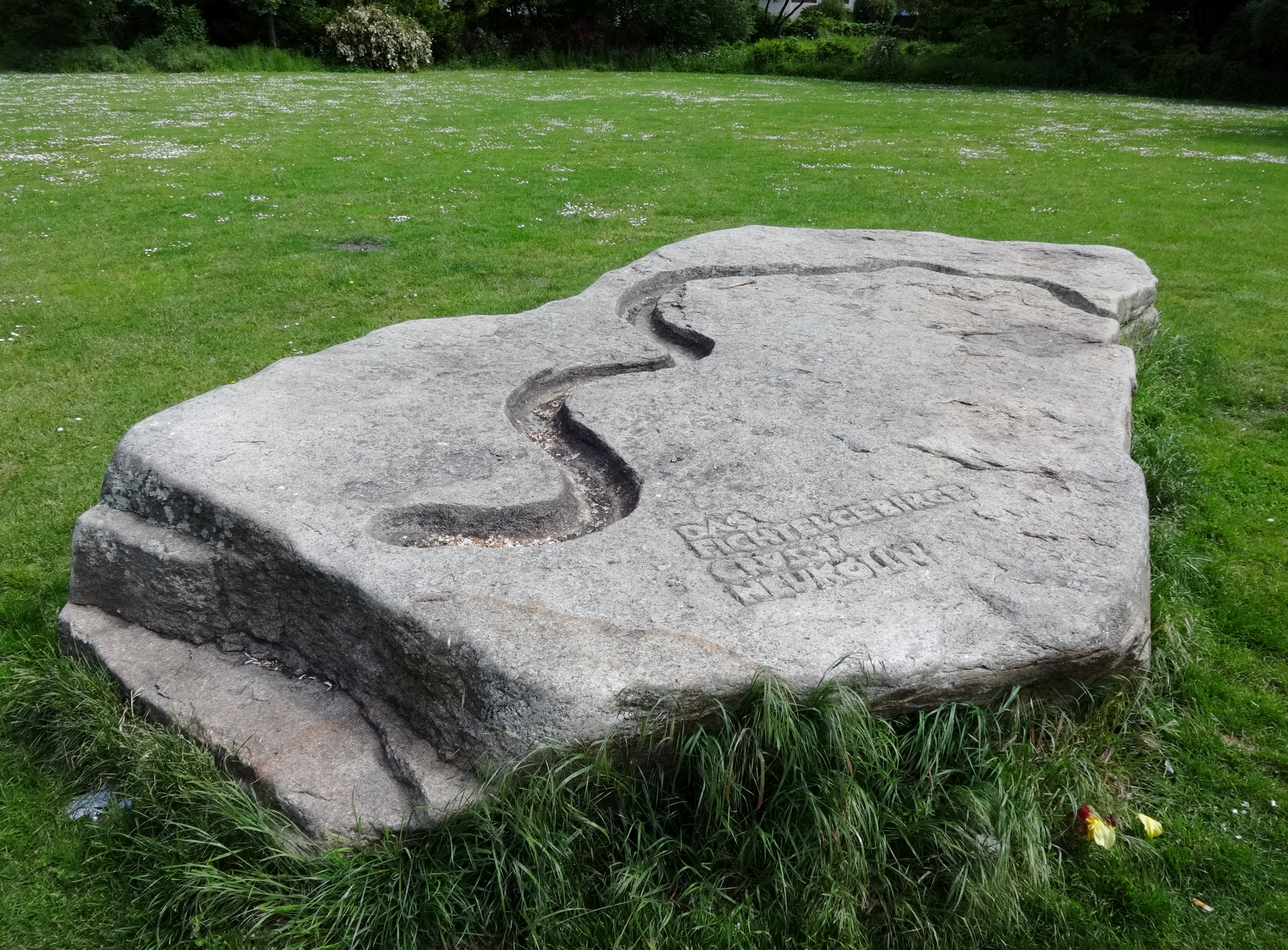 Herbert-Krause-Park in Berlin-Neukölln, benannt nach dem ehemaligen Leiter des Grünflächenamtes und Bestandteil der High-Deck-Siedlung.